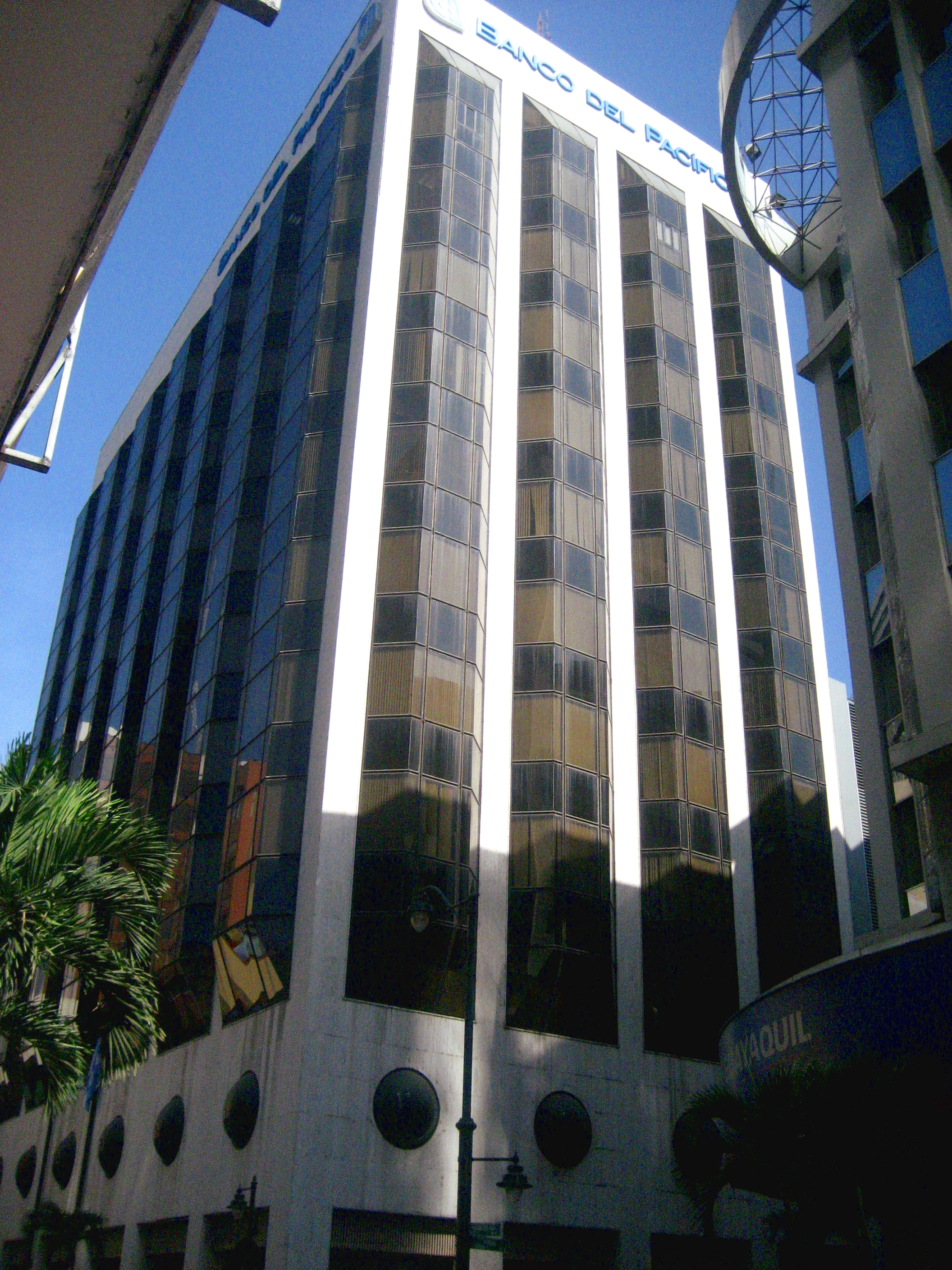 Matriz del Banco del Pacifico en Guayaquil